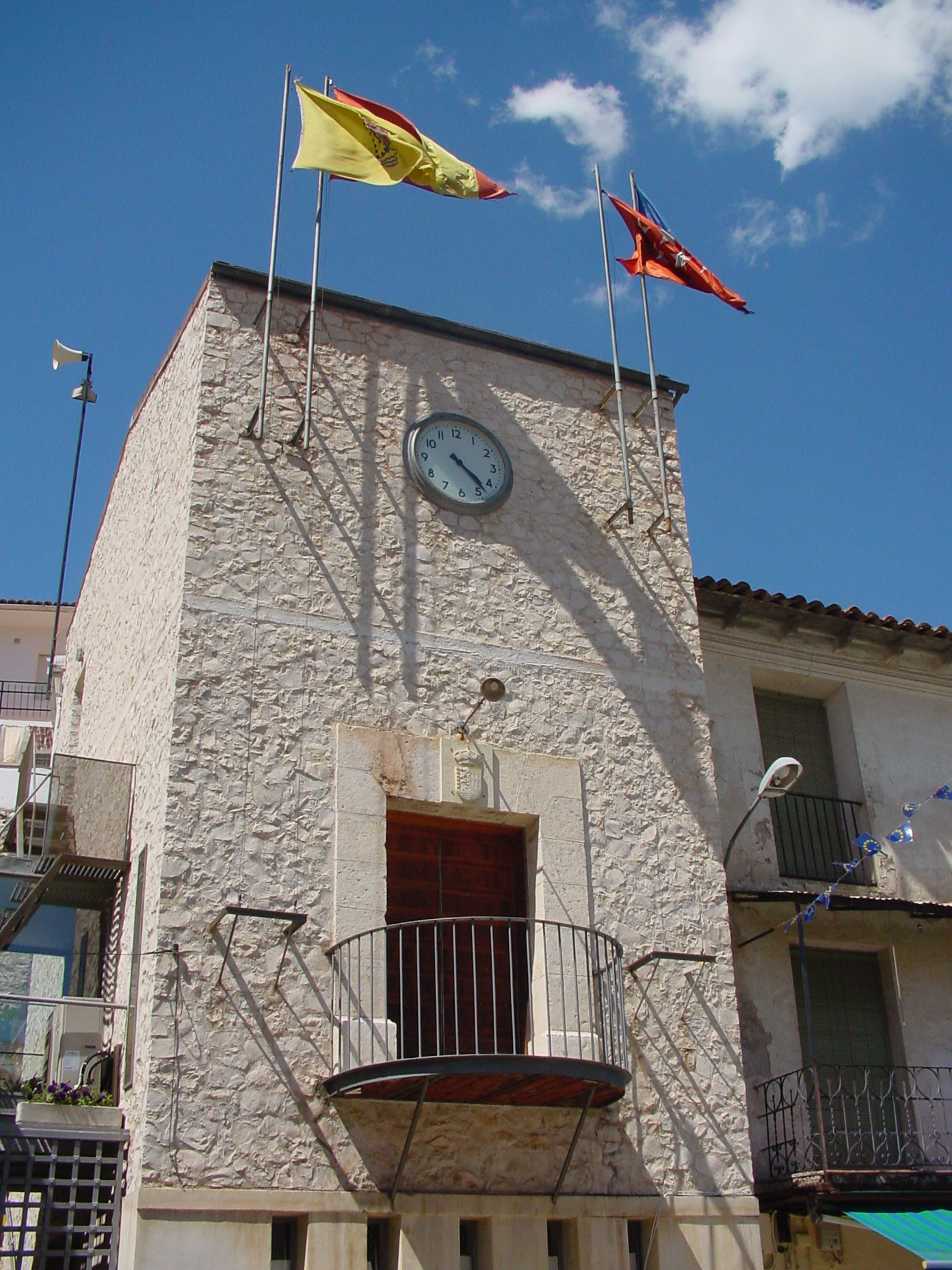 Ayuntamiento de Valdelaguna.